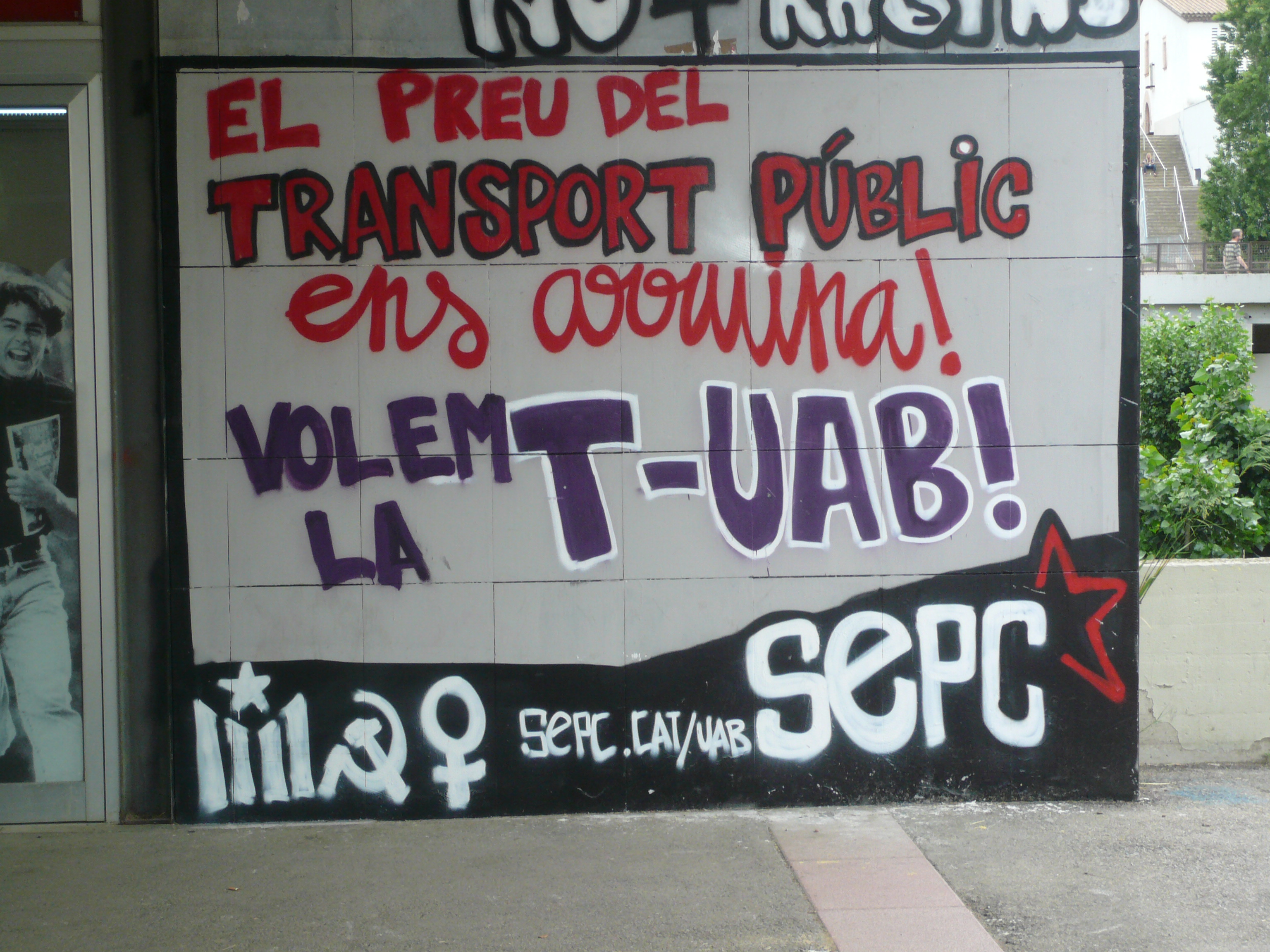 Mural de denúncia per l'augment dels preus del transport públic, realitzat a principis de l'any 2012 pel Sindicat d'Estudiants dels Països Catalans, situat a l'entrada d'accés a la Plaça Cívica del campus de Bellaterra de la Universitat Autònoma de Barcelona des de l'estació d'Universitat Autònoma de Ferrocarrils de la Generalitat de Catalunya.